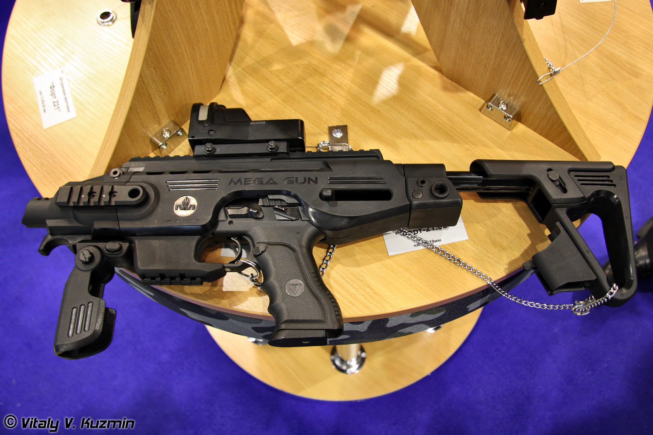 Пистолет Форт-21.02 с модулем Mega Gun (Fort-21.02 pistol with Mega Gun module)